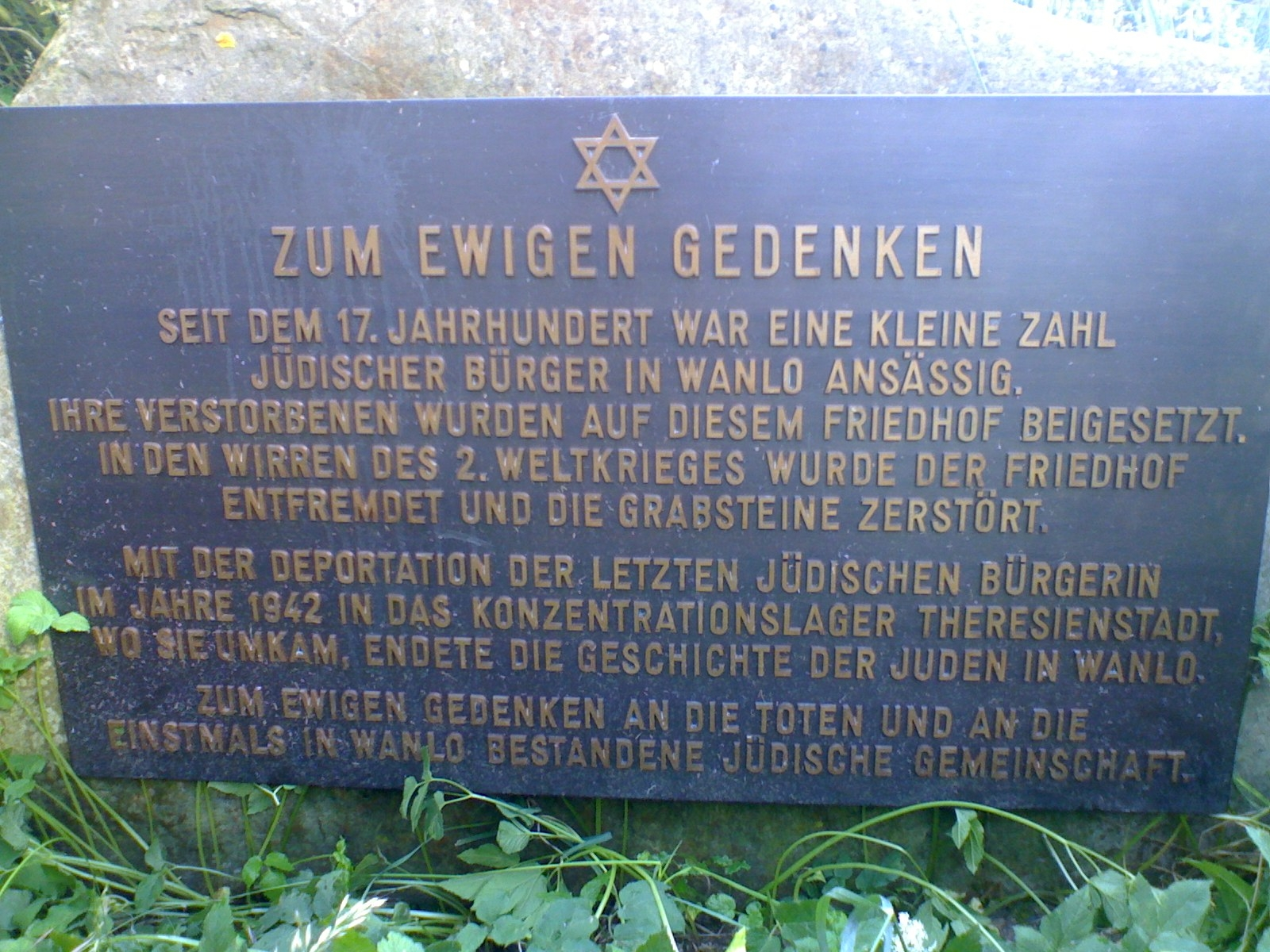 Gedenkstein am ehemaligen jüdischen Friedhof. Heute erinnert nur noch ein Gedenkstein an den jüdischen Friedhof.